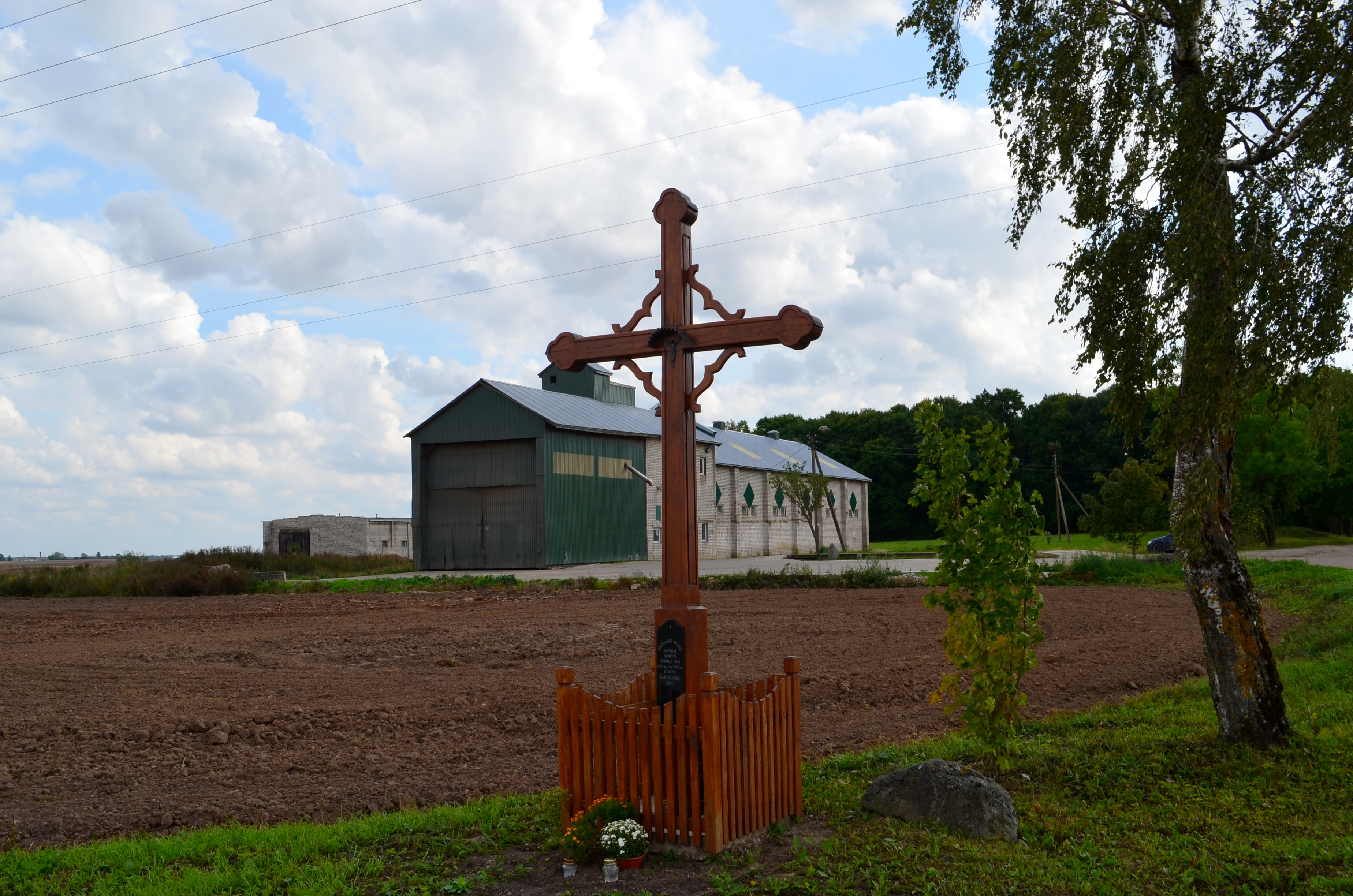 Kryžius Digraičių dvaro sodybai atminti, Kėdainių raj.